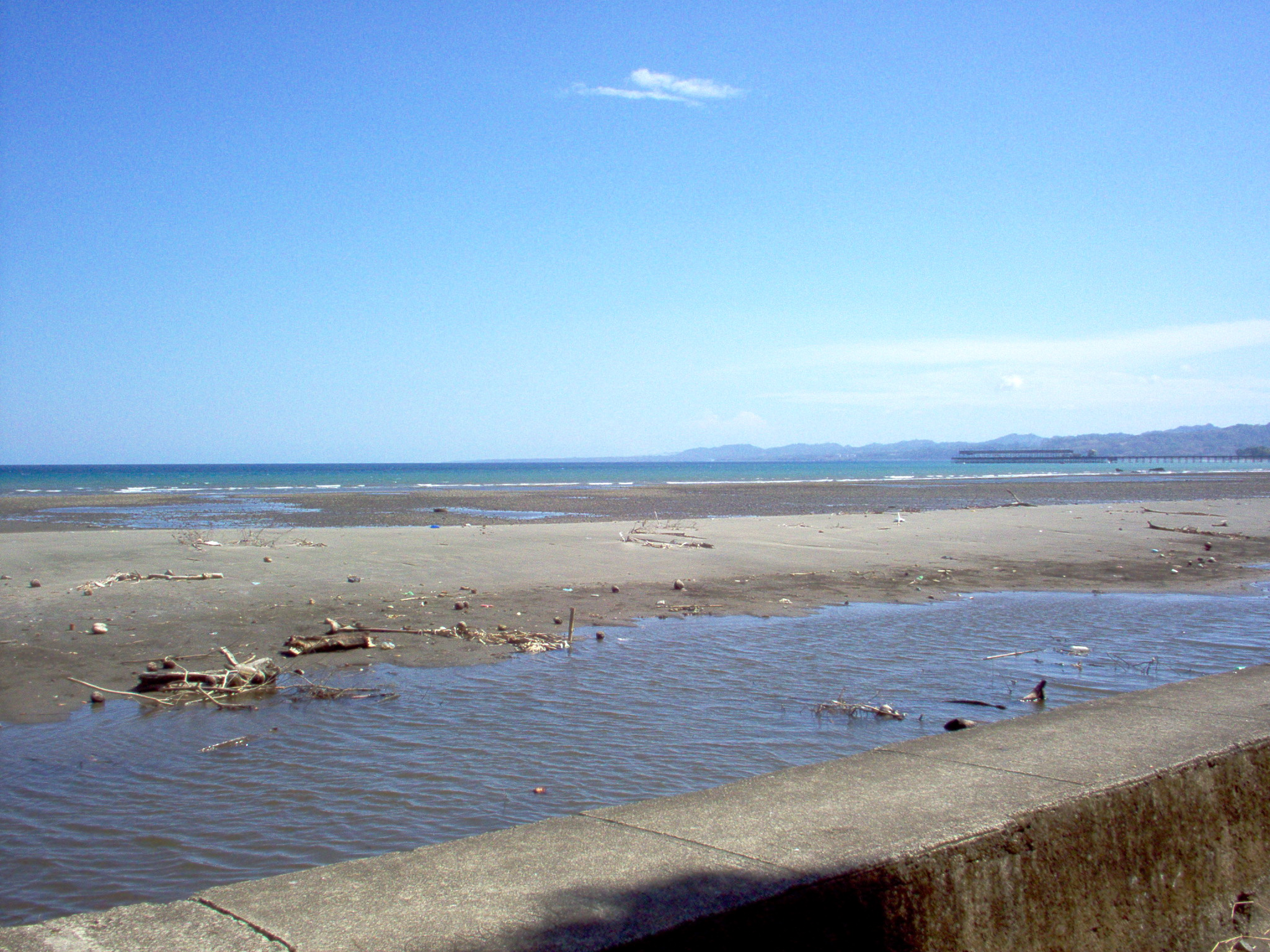 Playa de la ciudad de Puerto Armuelles, Chiriquí, Panamá. Al fondo a la derecha, vista del puerto de la ciudad, al centro Punta Burica, punto fronterizo entre Panamá y Costa Rica. Foto tomada personalmente.